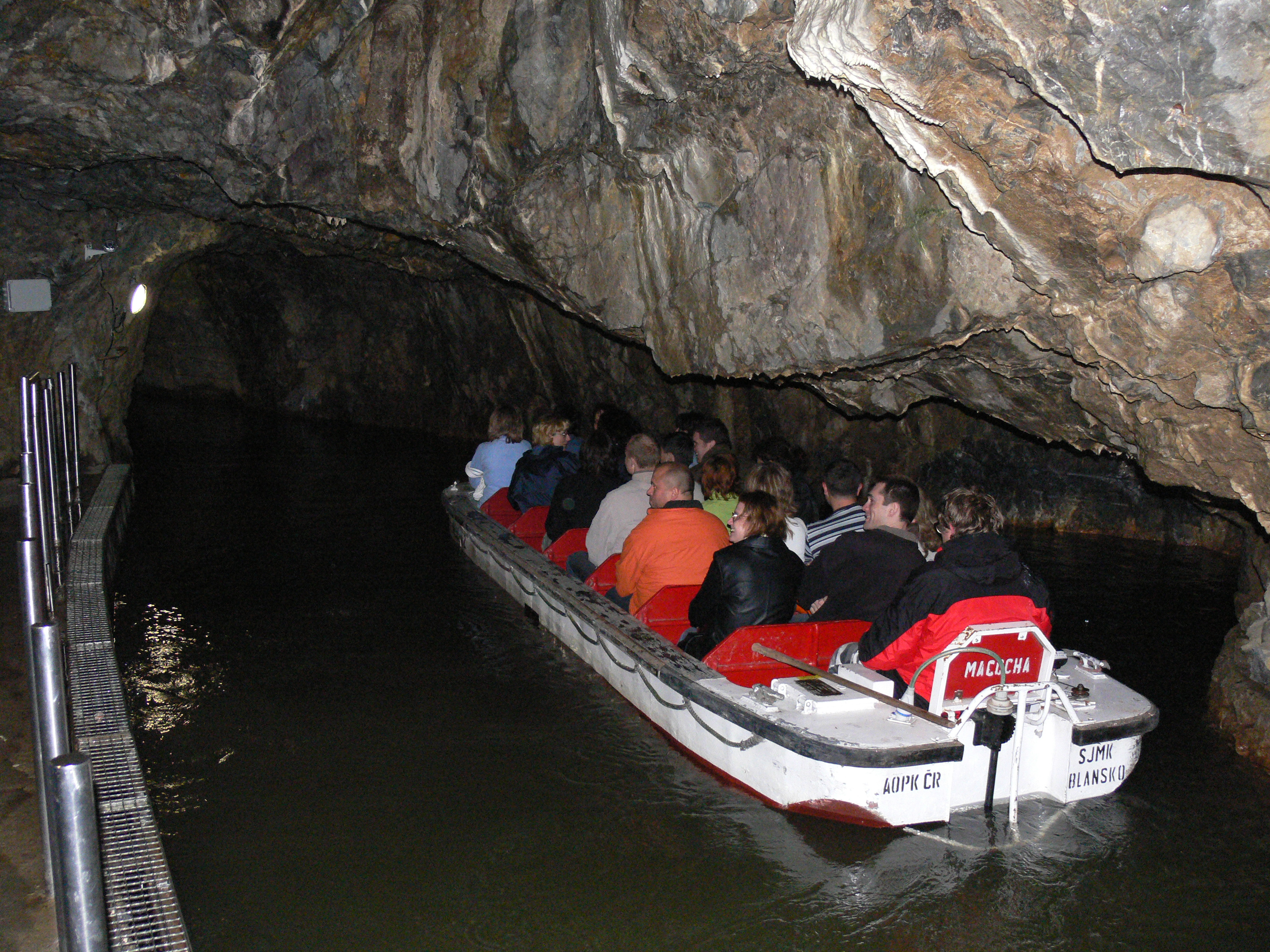 Punkva – podzemní plavba